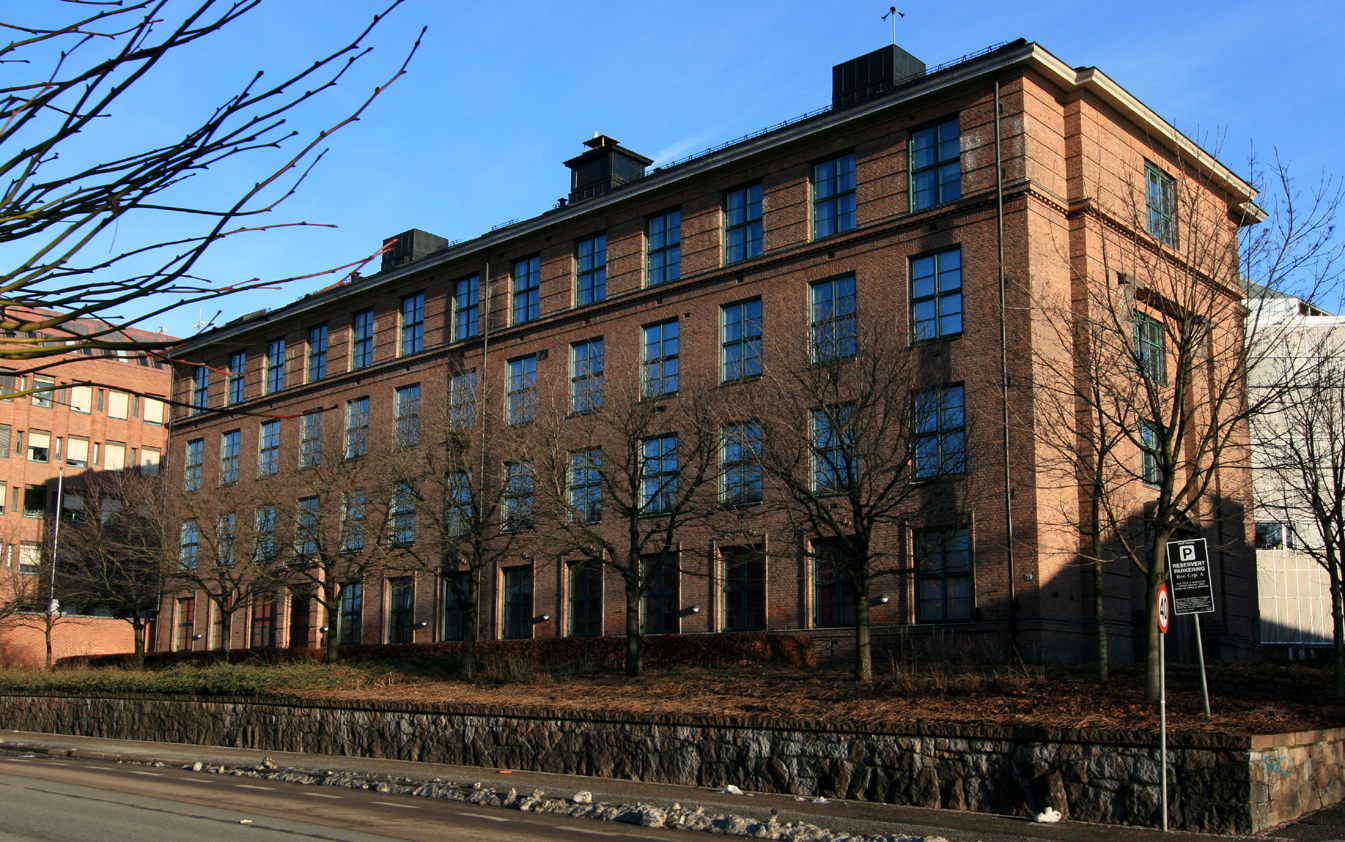 Tannlegehøyskolen (Det odontologiske fakultet), Universitetet i Oslo. Bygd i 1926 etter tegninger av ark. Th. Chr. Hauff.